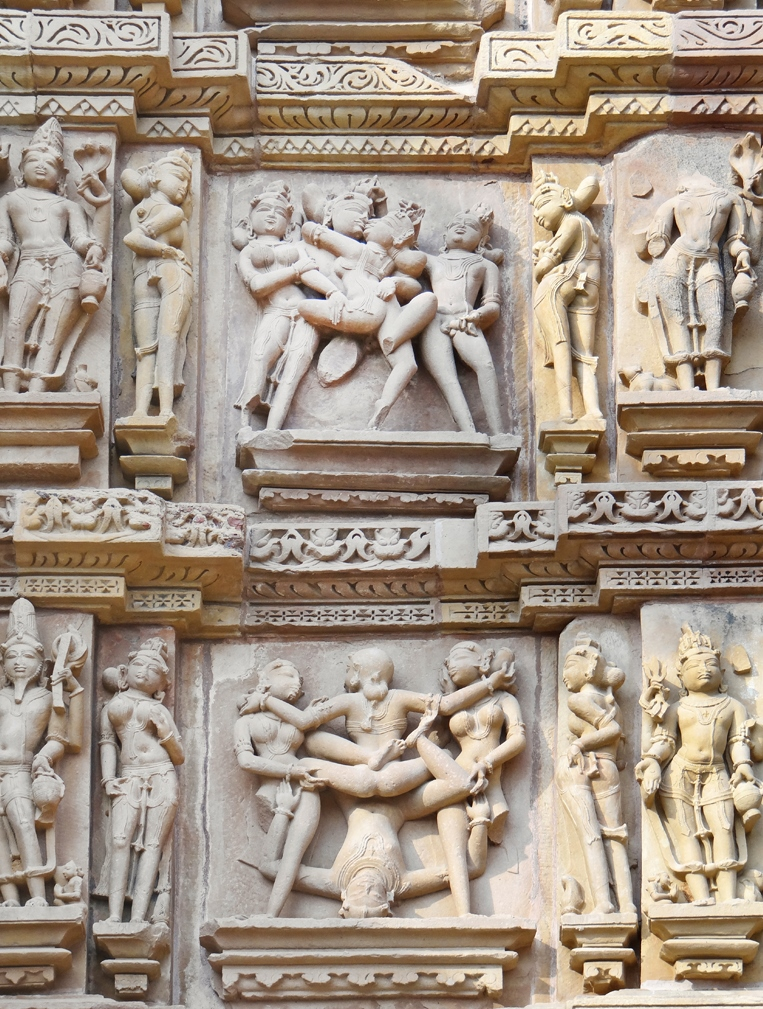 Sculptures murales d'inspiration tantrique sur les murs du temple Kandarîya Mahadeveda à Khajuraho. Pour le Tantrisme, il ne s'agit pas de représentations de poses sexuelles mais de celles de couples yogi unis dans l'extase et servant de symbole universel à l'accomplissement spirituel (Genetical craftmanship of the word of God). Le Tantrisme tente de saisir la nature du temps et de remonter l'échelle de la Genèse en réveillant toutes les énergies et les émotions disponibles, pour les rassembler et en faire le véhicule vers l'Illumination. Ce temple est dédié à Shiva, il a été construit entre 1025 et 1050 Le Temple de Kandariya Mahadeva est le plus grand et le plus décoré de l'ensemble de temples hindouistes de Khajuraho dans l'état du Madhya Pradesh en Inde. Il est considéré comme l'un des meilleurs exemples des temples de l'époque médiévale en Inde. Extrait de l'article de Wikipedia sur le temple (voir le plan) ____________ Les temples de Khajuraho sont inscrits sur la liste du patrimoine mondial de l'UNESCO. A l'époque médiévale, le site appelé Jejakbhukti, était la capitale du royaume des rajas Chandelas qui ont pris le pouvoir au début du Xème siècle. Ils y ont fait construire 85 temples dont seulement 25 existent encore aujourd'hui dans différents états de conservation mais tous ont été restaurés. Le site de Khajuraho a perdu de son importance vers 1500. La plupart des temples sont construits en grès, certains sont en granite. Ils font partie des chefs-d’œuvre de l'art hindou. Article de Wikipedia sur Khajuraho Les temples sur Insecula Site indien